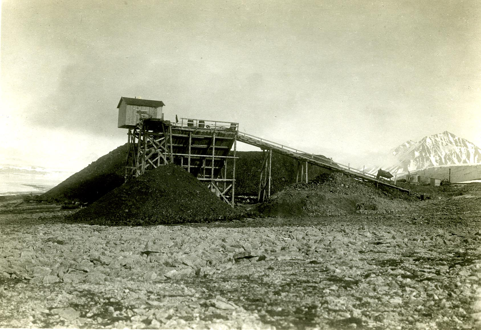 Gruveinngangen og kulltippen. I huset er det en motor som trekker vognene fra gruven. Arkivref.: PA-1632D1_2_9 Foto: Sigvald Moa